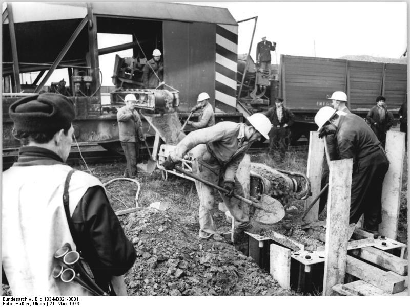 Eisenbahnstreckenbau, CSD-Betonmischzug ADN-ZB Häßler 21.3.73 Bez. Dresden: Künftig mit "120" in Richtung CSSR- 500 Betonfundamente für Fahrleitungsmasten zur Aufnahme des elektrischen Zugbetriebes haben CSSR-Baukollektive jetzt am gegenwärtig wichtigsten komplexen Rekonstruktionsvorhaben der Deutschen Reichsbahn, der Transitstrecke Dresden-Schöna- Staatsgrenze CSSR, fertiggestellt. Gemeinsam mit Werktätigen aus etwa 40 Betrieben des befreundeten Nachbarlandes und der DDR lösten sie eine der Aufgaben des sozialistischen Komplexwettbewerbes, der den termin- und qualitätsgerechten Abschluß aller Bauabschnitte vorsieht. Unser Foto zeigt einen Blick auf einen Betonmischzug der CSD. Bauarbeiter füllen Beton in die Fundamente für die Oberleitung. Die Traktionsumstellung ermöglicht Geschwindigkeiten bis zu 120 km-h.